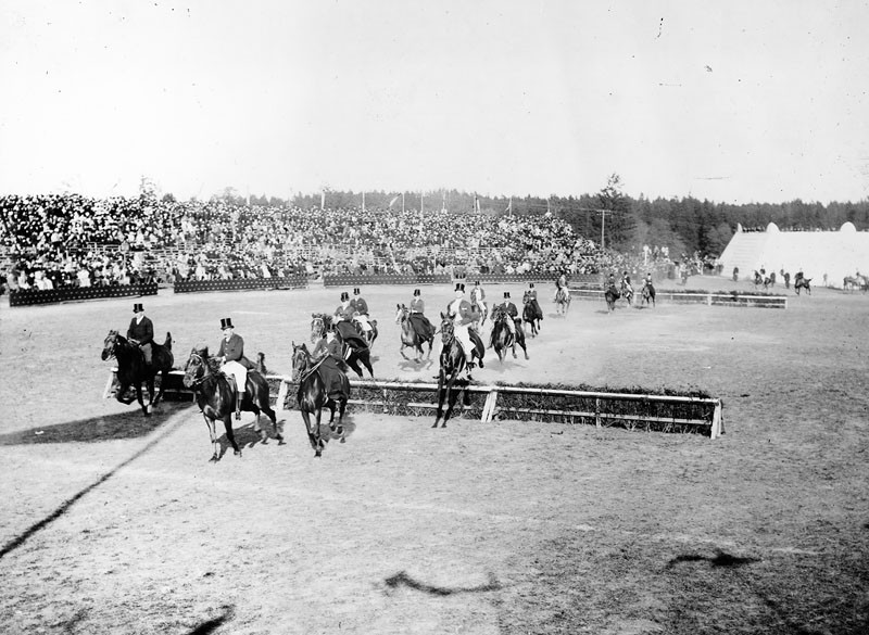 Lindarängen. Ladugårdsgärdet, steeplechase med ryttare